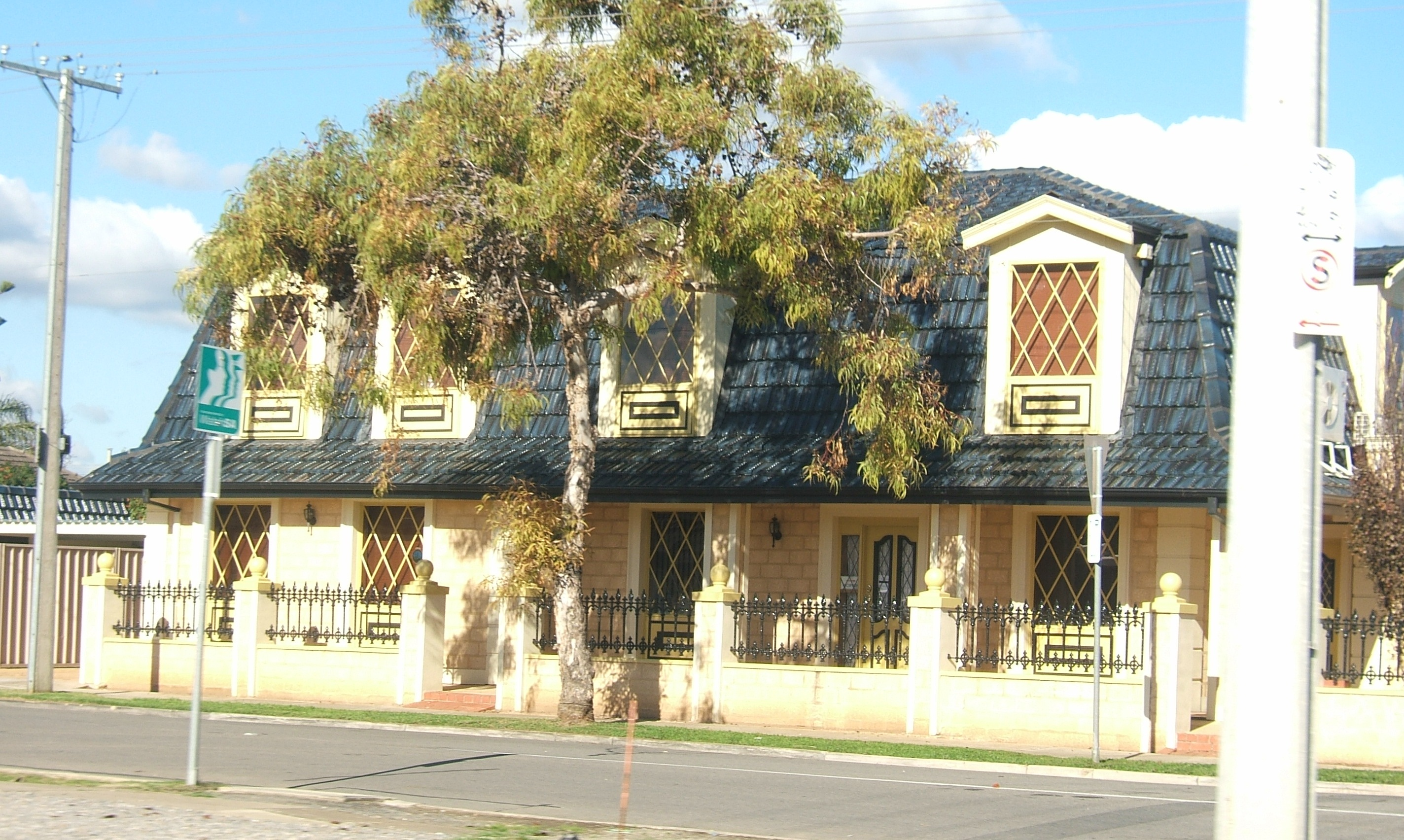 Richmond, Adelaide